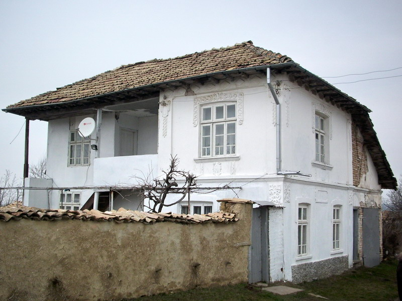 Село Глогинка, община Попово. Селска къща.